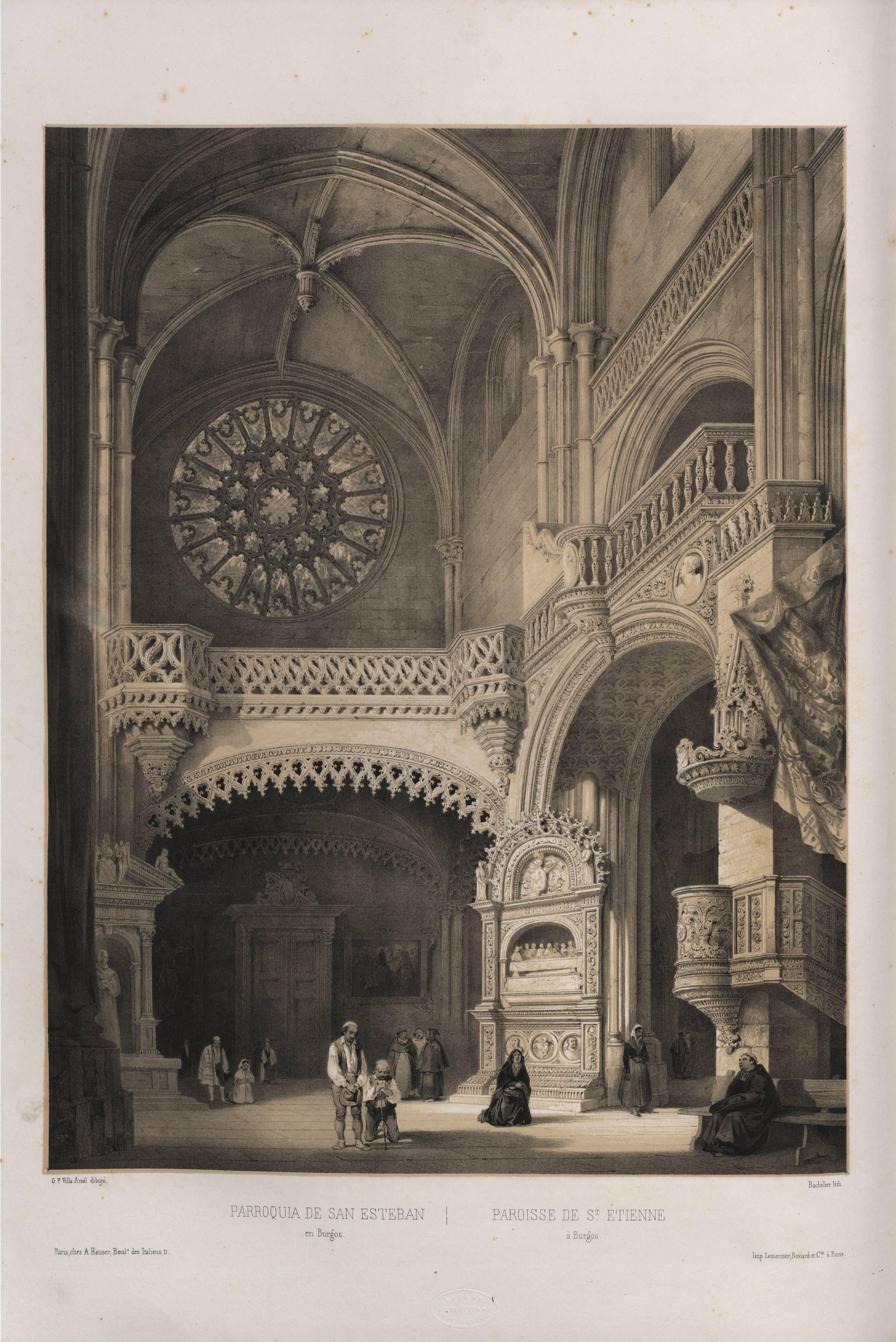 Parroquia de San Esteban en Burgos.